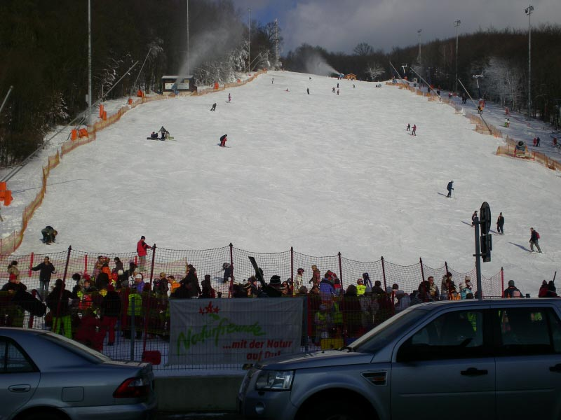 Schibetrieb auf der Hohe-Wand-Wiese in Wien-Penzing